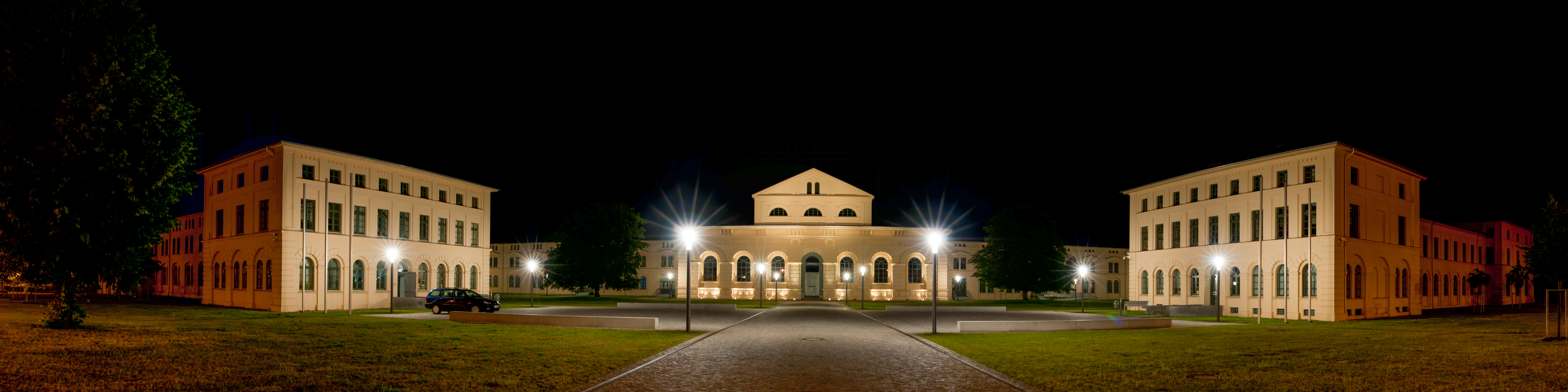 Panoramaansicht des Schweriner Marstalls bei Nacht Wikipedia im Landtag – Mecklenburg-Vorpommern 19. bis 21. Juni 2013 in Schwerin Fragen zur Nachnutzung Wenn Sie Fragen zur Nachnutzung dieses Bildes haben, können Sie sich jederzeit gern an wenden Personality rights warningAlthough this work is freely licensed or in the public domain, the person(s) shown may have rights that legally restrict certain re-uses unless those depicted consent to such uses. In these cases, a model release or other evidence of consent could protect you from infringement claims.